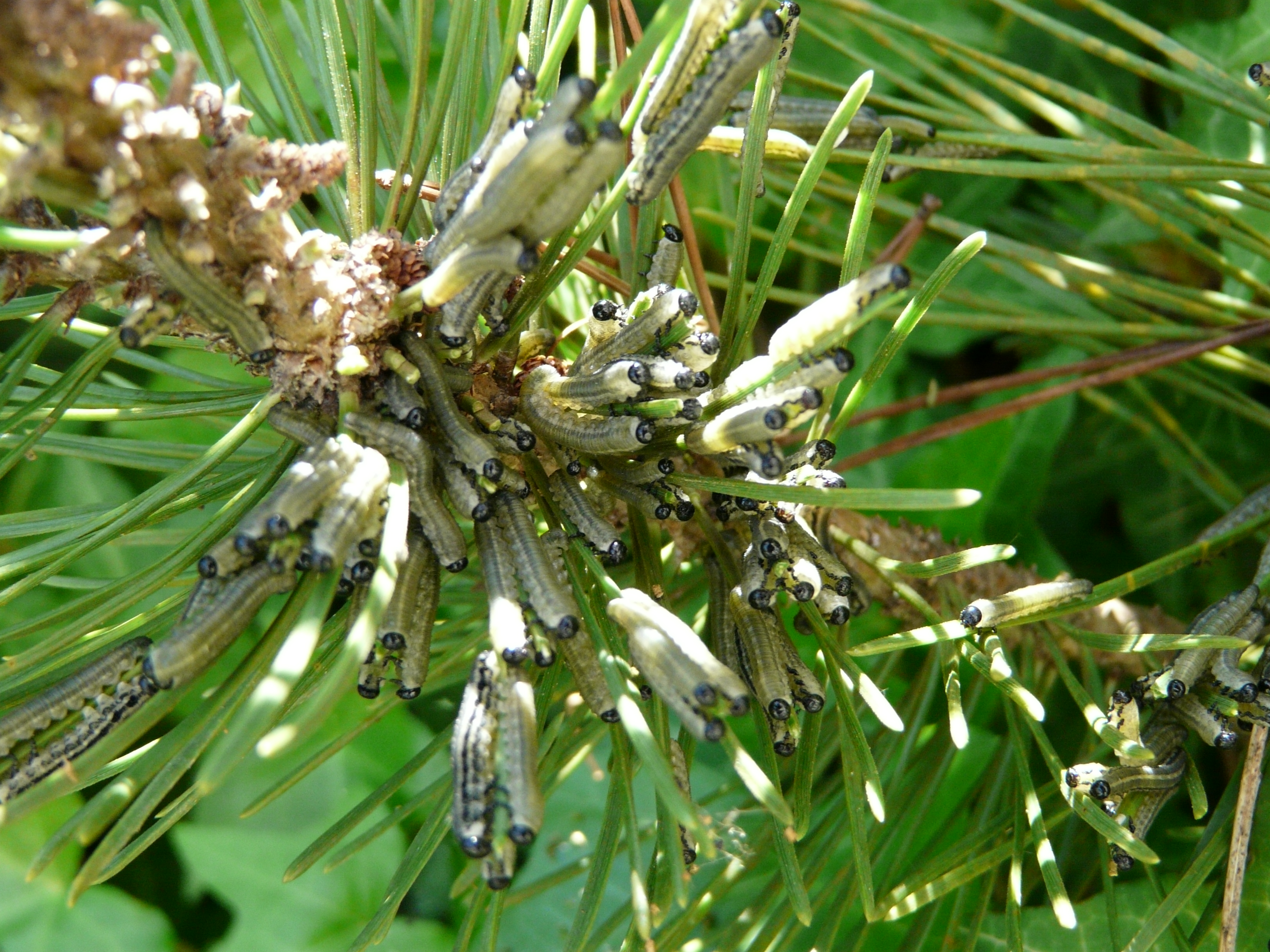 Colonie de chenilles de Neodiprion sertifer sur un pin nain, Périgueux, Dordogne, France